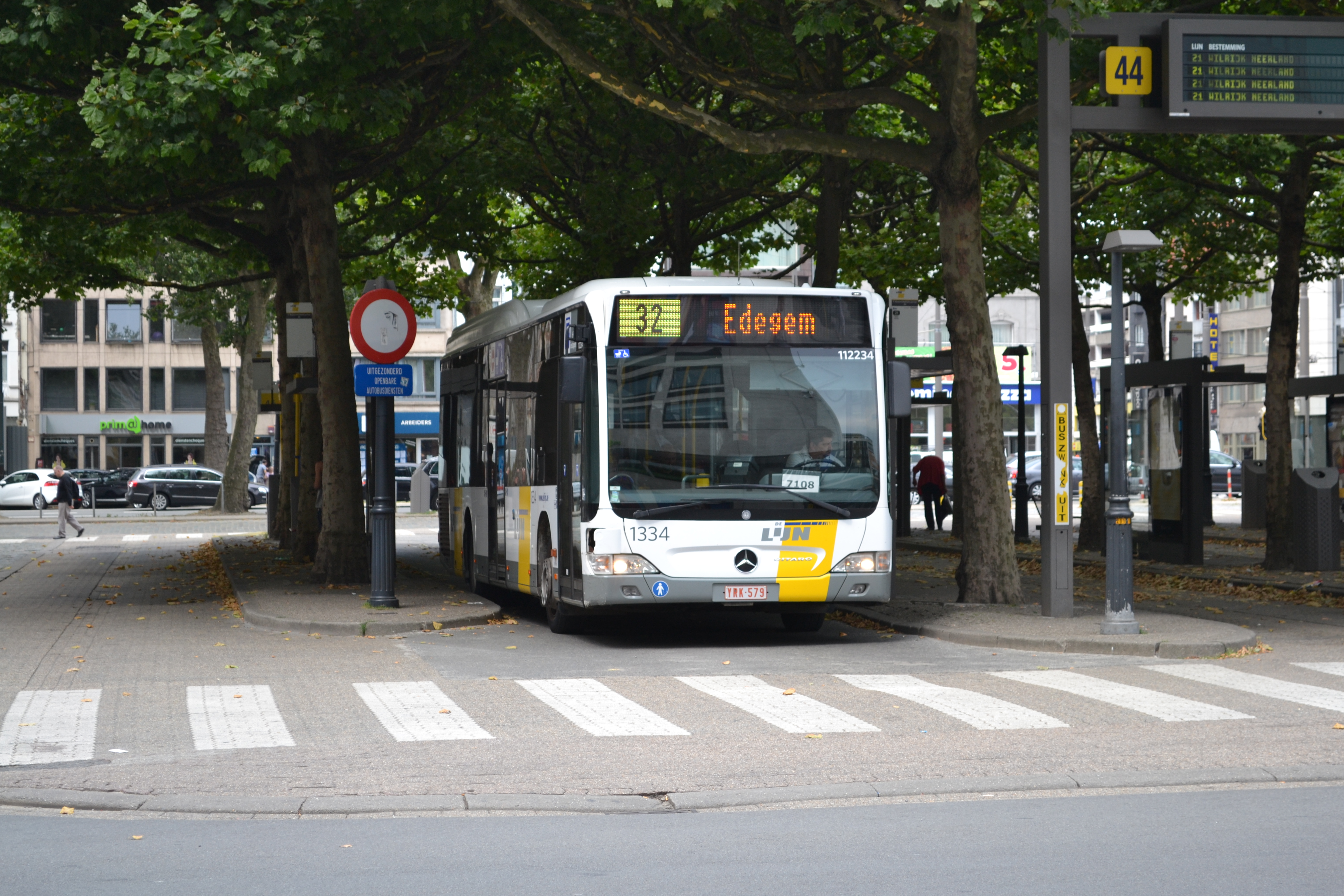 Connex West-Vlaanderen 112234, een Citaro Ü, als lijn 32 naar Edegem, op de Antwerpse F. Rooseveltplaats. Connex West-Vlaanderen is een onderaannemer van De Lijn